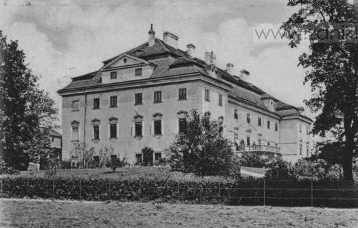 Zámek v Chlumci, pohled od studánky